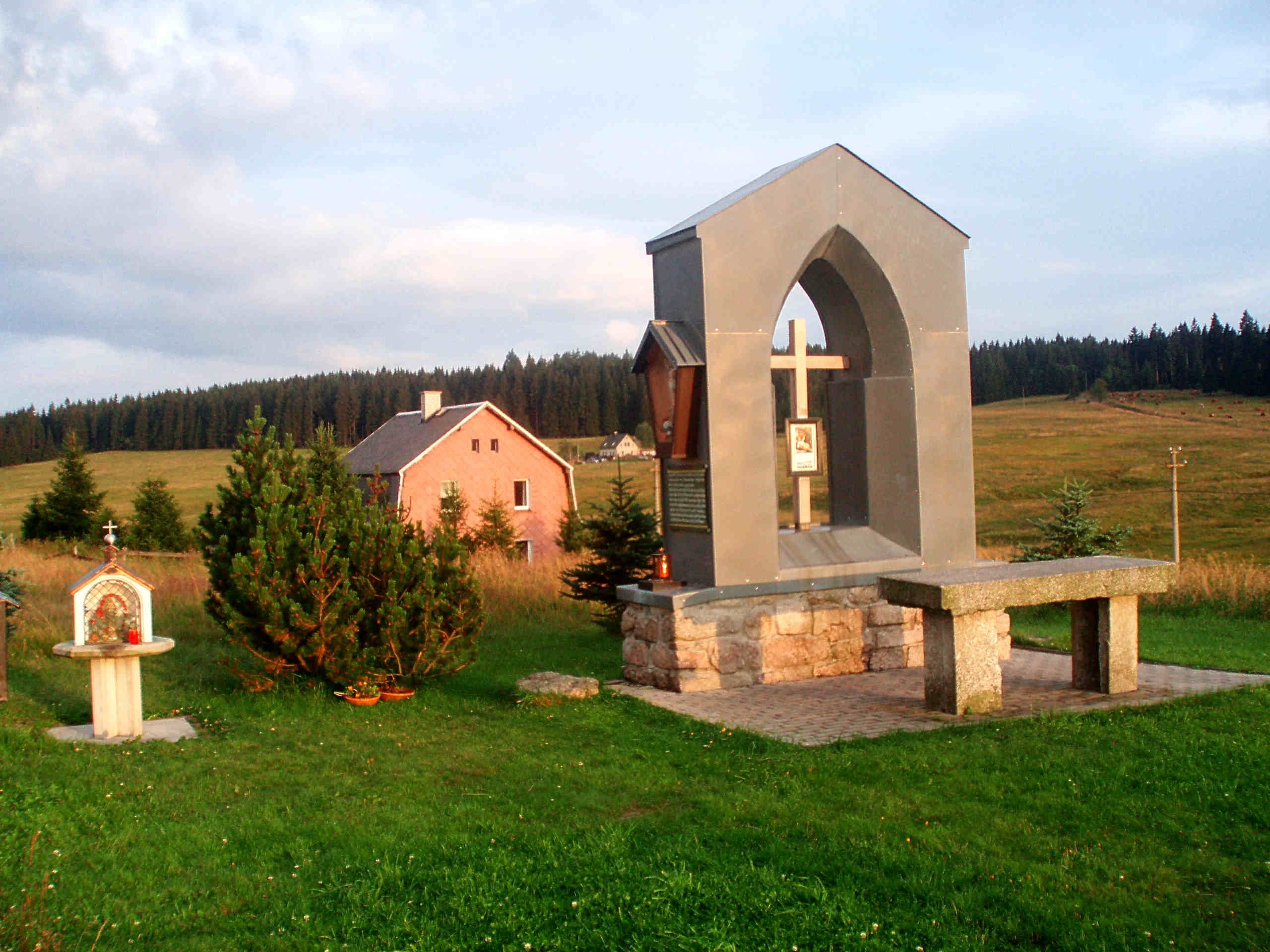 Abendstimmung in Hirschenstand